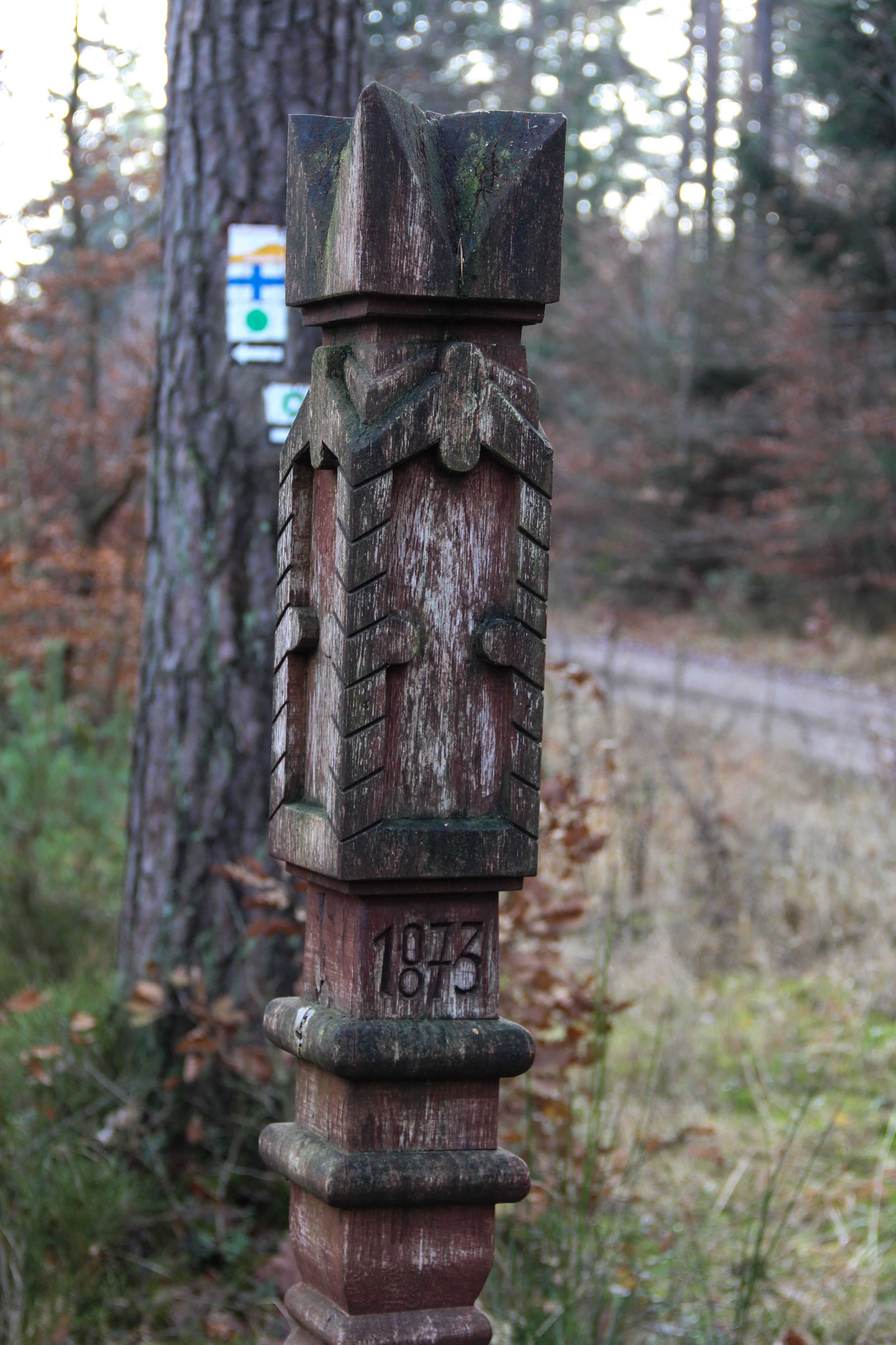 Holzsäule Rote Marter